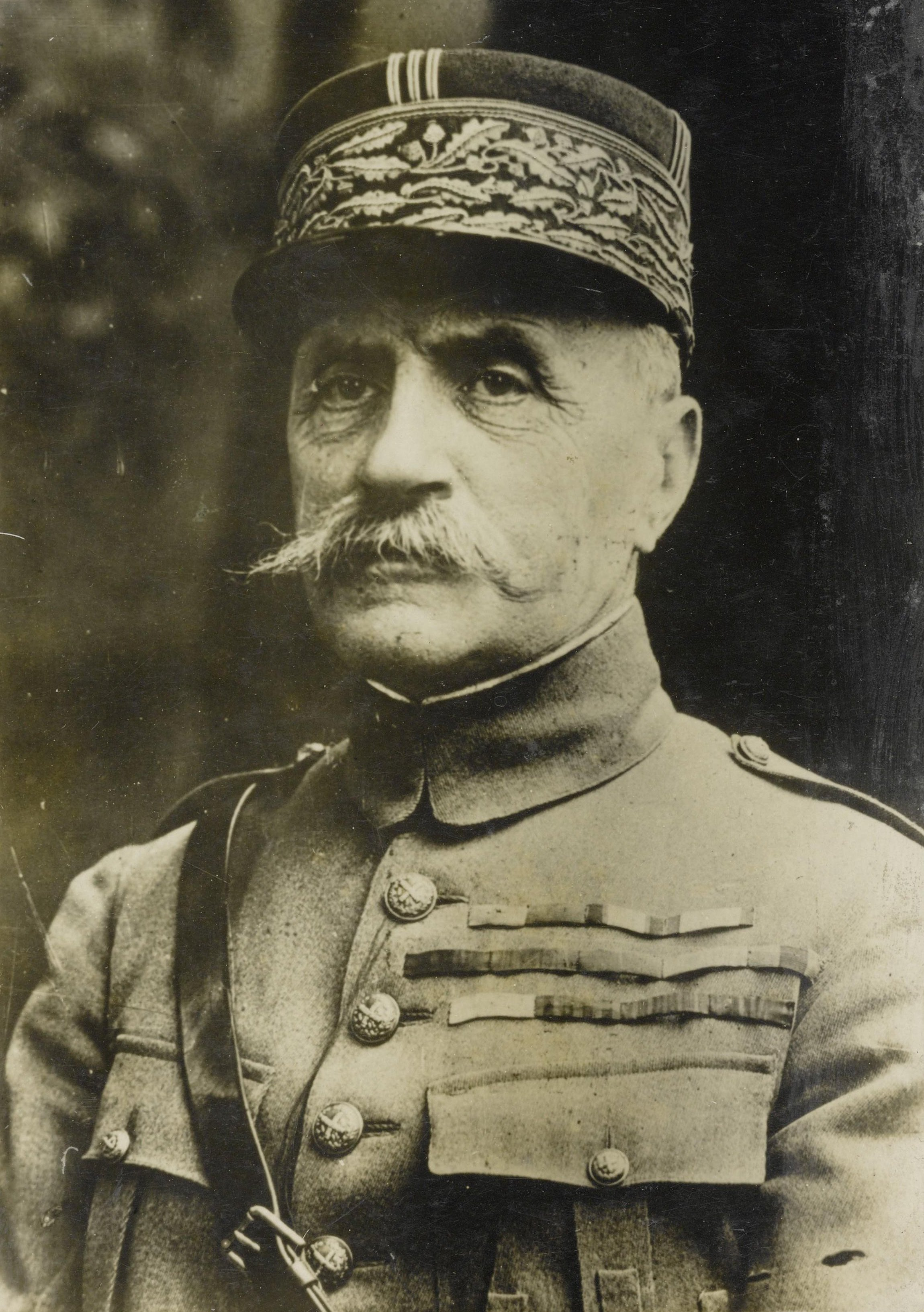 Collectie / Archief : Fotocollectie Eerste Wereldoorlog Reportage / Serie : [ onbekend ] Beschrijving : Maarschalk Ferdinand Foch (1851-1929) Datum : {1914-1918} Locatie : Frankrijk Trefwoorden : eerste wereldoorlog, legerleiders Persoonsnaam : Foch, Ferdinand Fotograaf : Sport & General Auteursrechthebbende : Public Domain logo Materiaalsoort : Foto (zwart/wit) Nummer archiefinventaris : bekijk toegang 2.24.09 Bestanddeelnummer : 158-1095